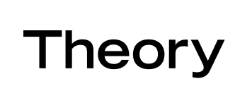 Theory fashion house corporate logo